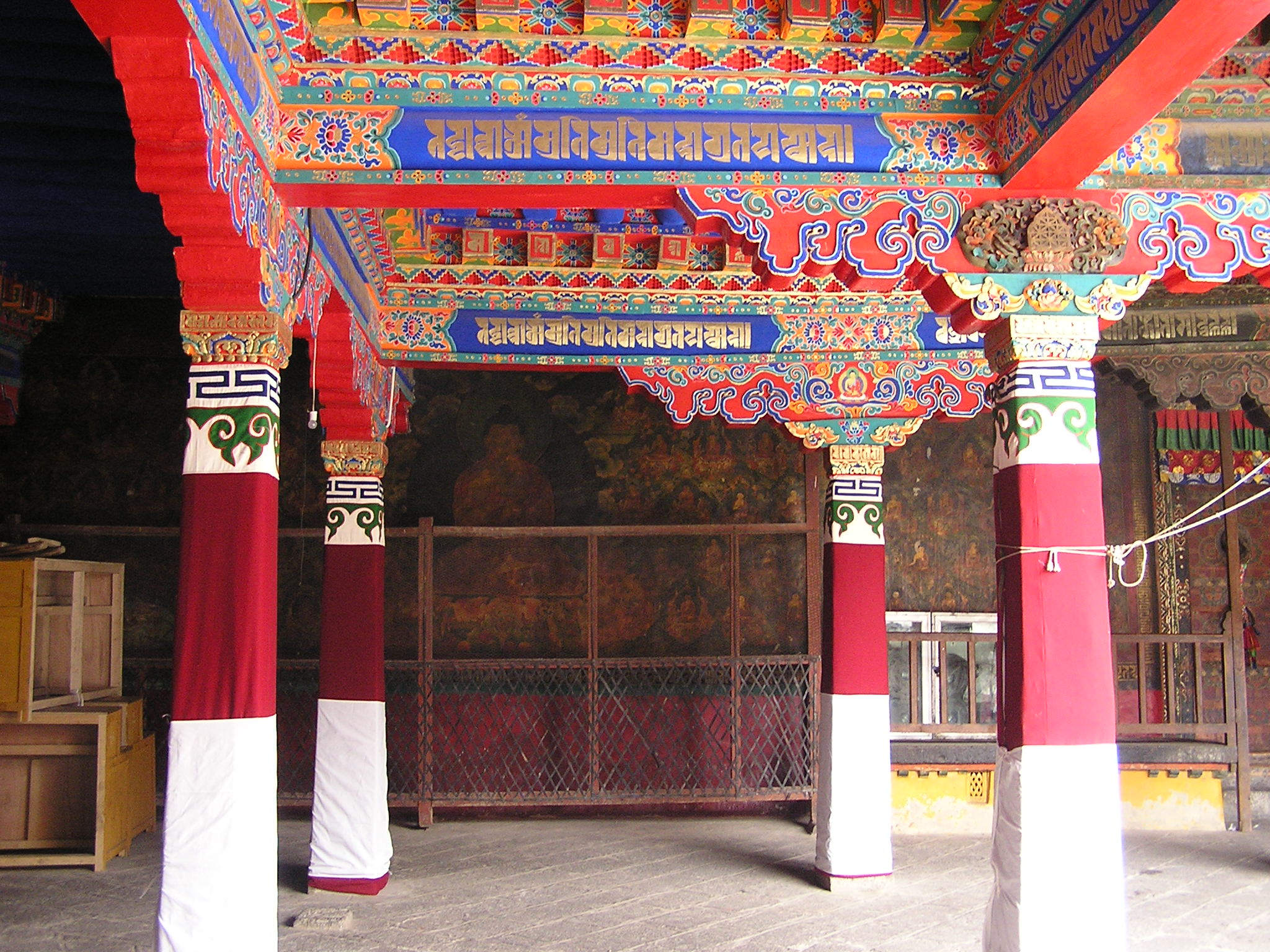 Jokhang Monastery 17.